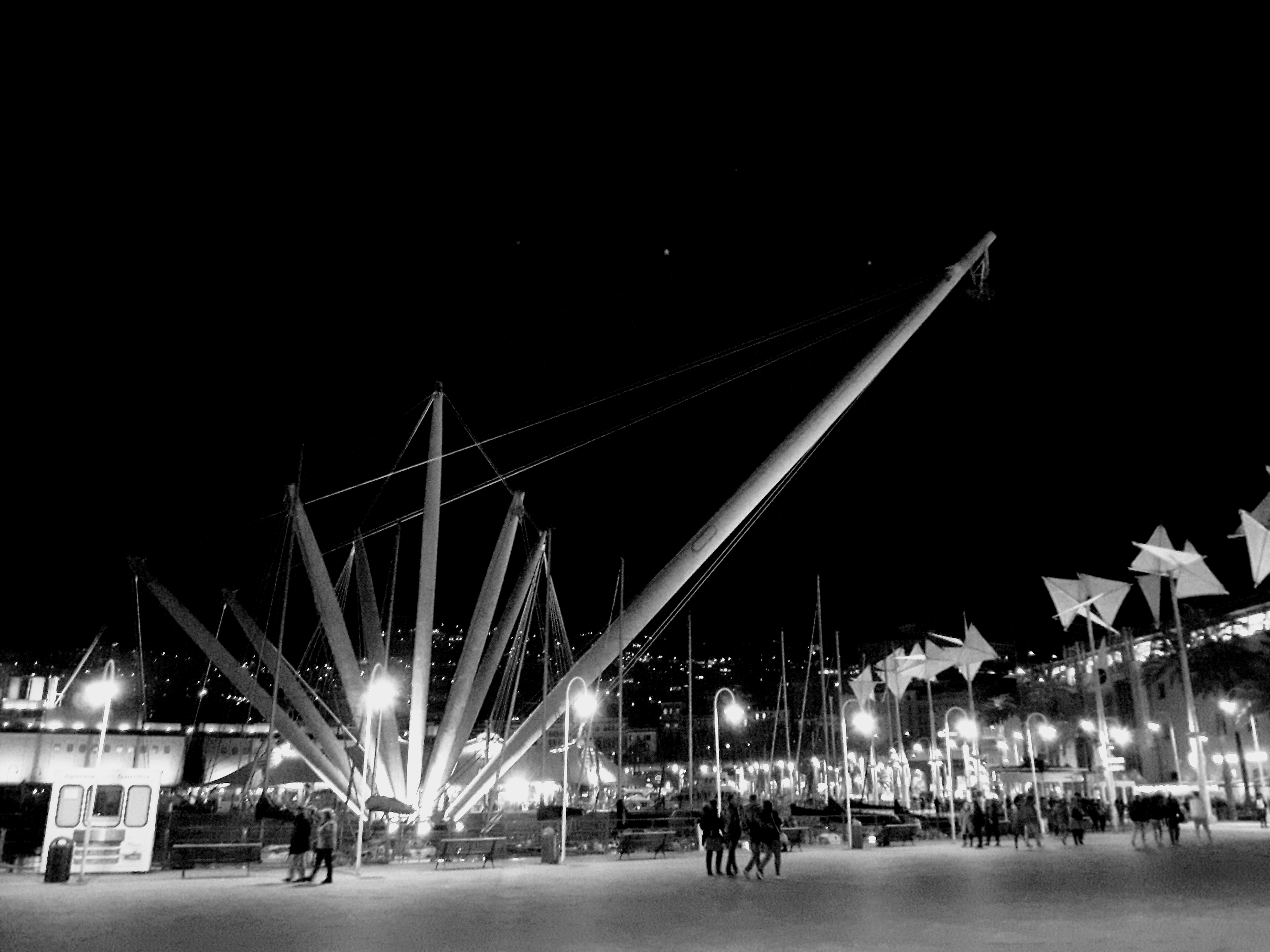 Una vastissima area affacciata sul mare in cui hanno sede oltre all'Acquario, numerosi punti di interesse artistico, museale, turistico, fieristico e di divertimento, su una superficie di oltre 230.000 metri quadrati.